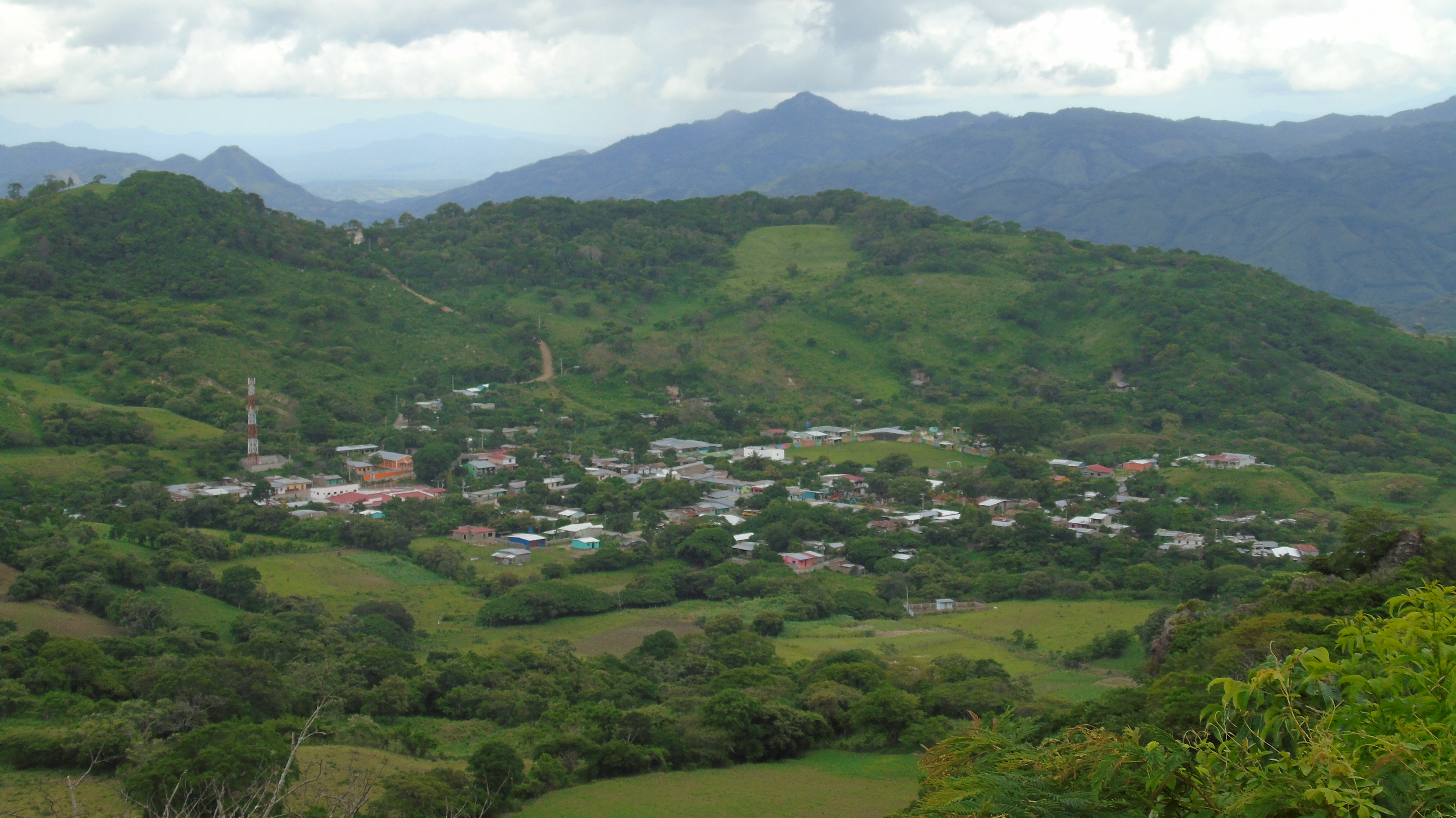 Vista San Nicolás